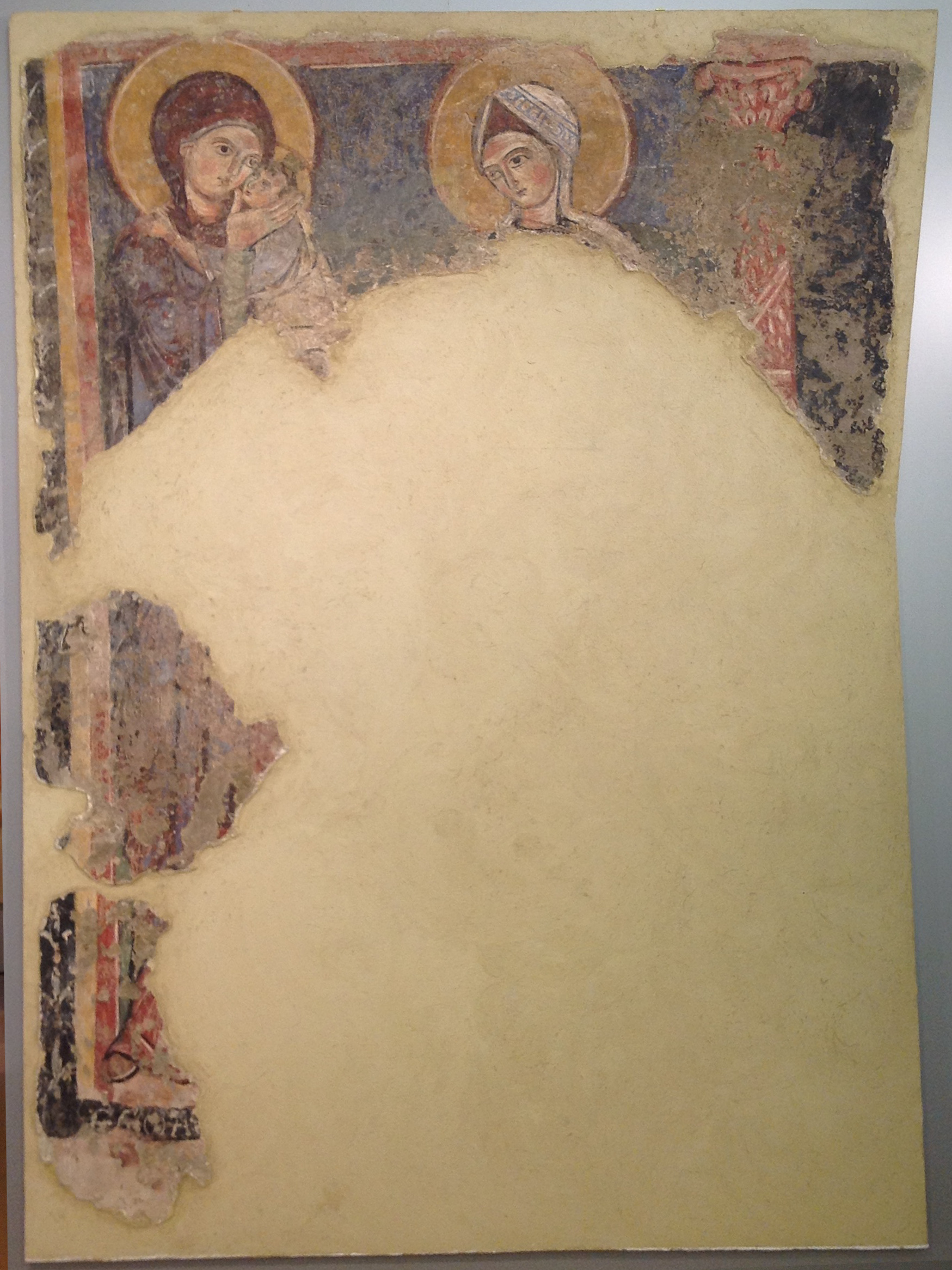 Affresco proveniente dall'ex chiesa di Santa Lucia in Gaeta.